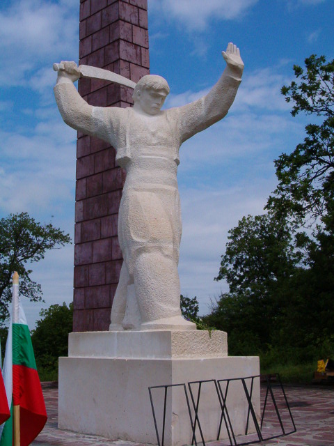 Новият паметник на Таньо Войвода на Керчан баир до село Априлово, Поповско, издигнат на мястото на откраднатия и унищожен в миналото метален (бронзов) паметник - снимка от 2005 година.